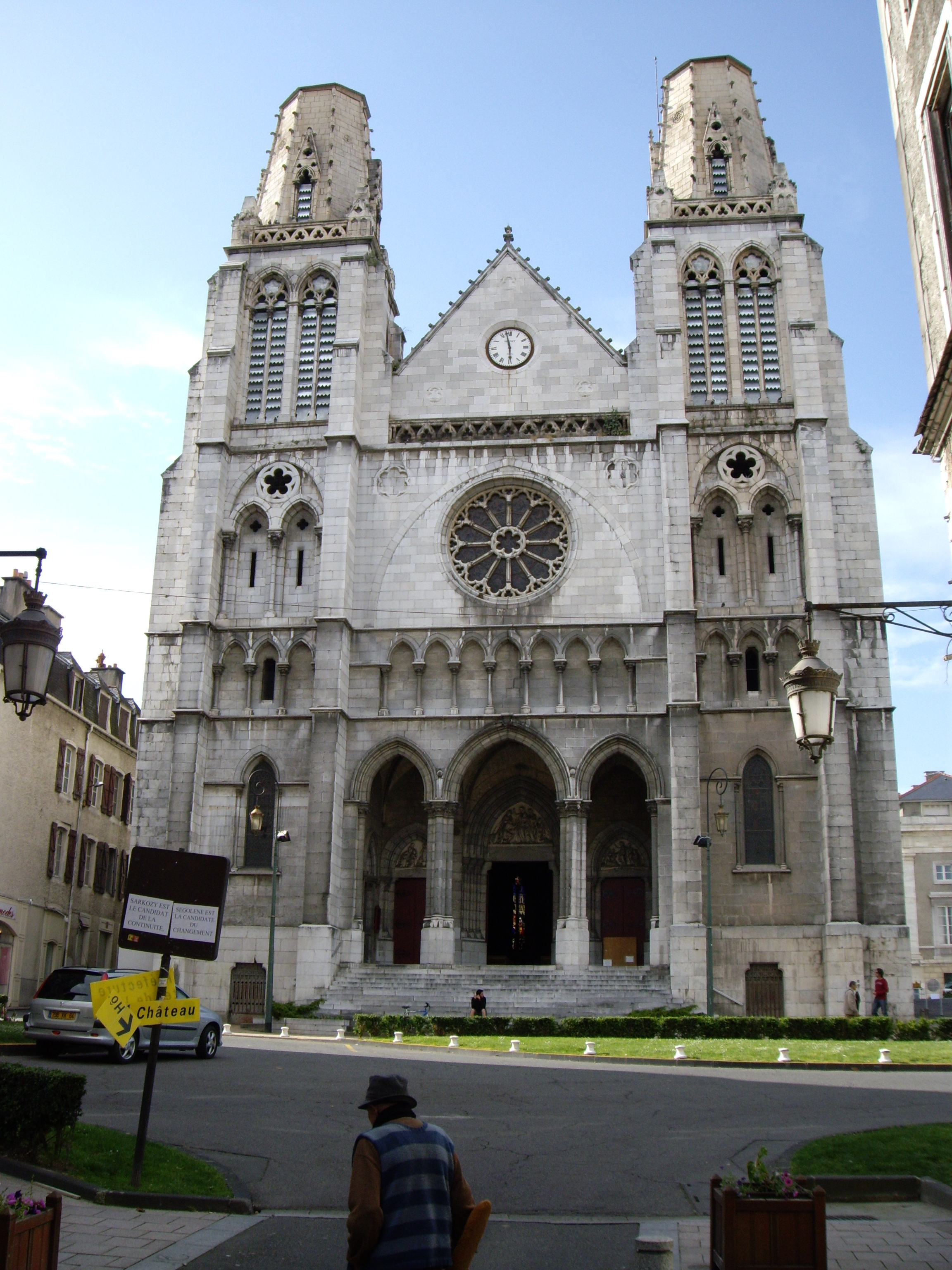 église Saint Jacques (Pau, 64)